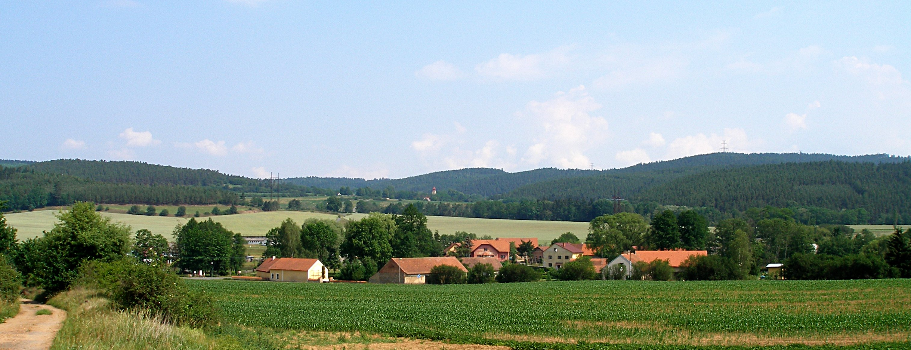 Drevníky (okres Příbram) - celkový pohled od jihu